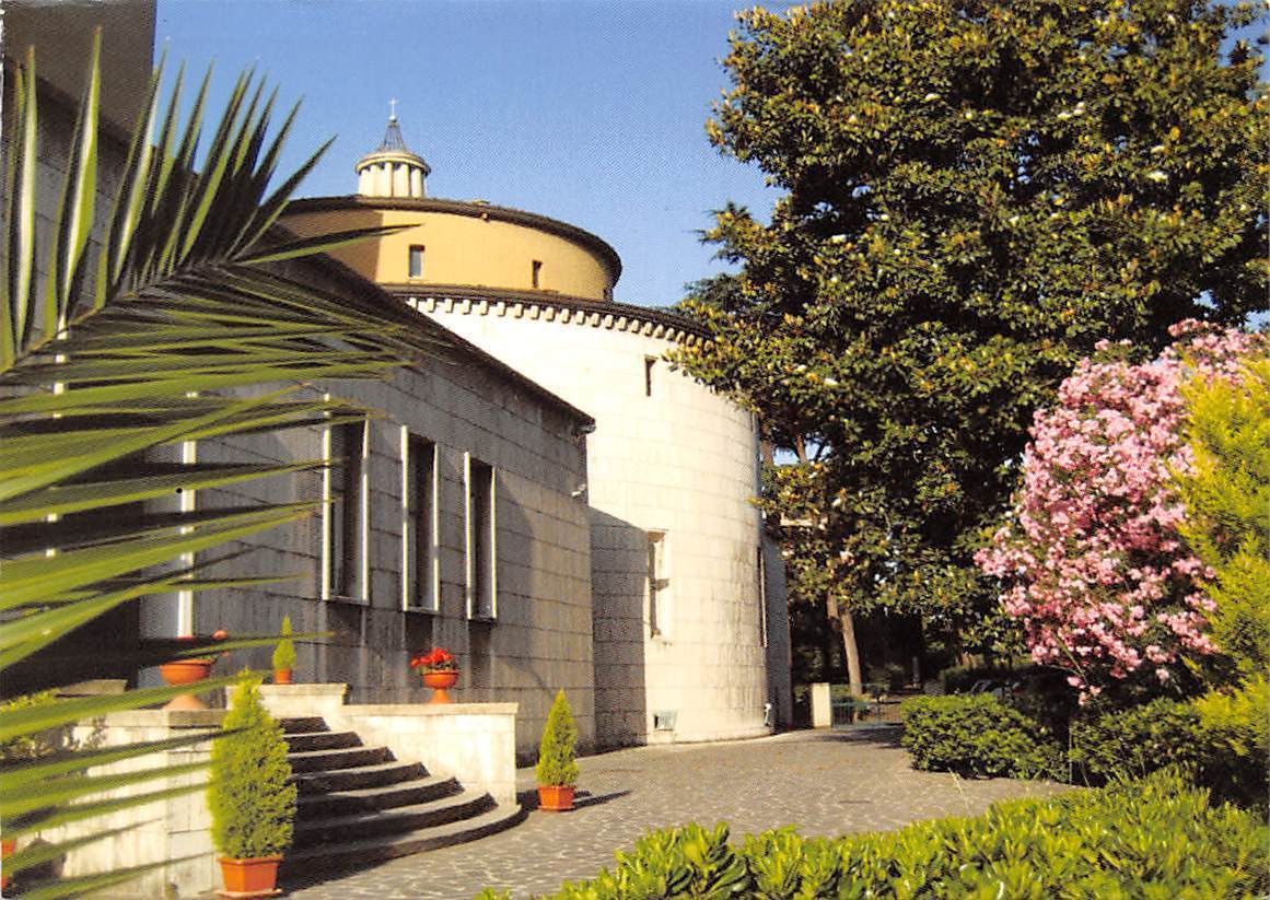 Maison généralice de la Société des missions d'Afrique (Pères blancs) à Rome.